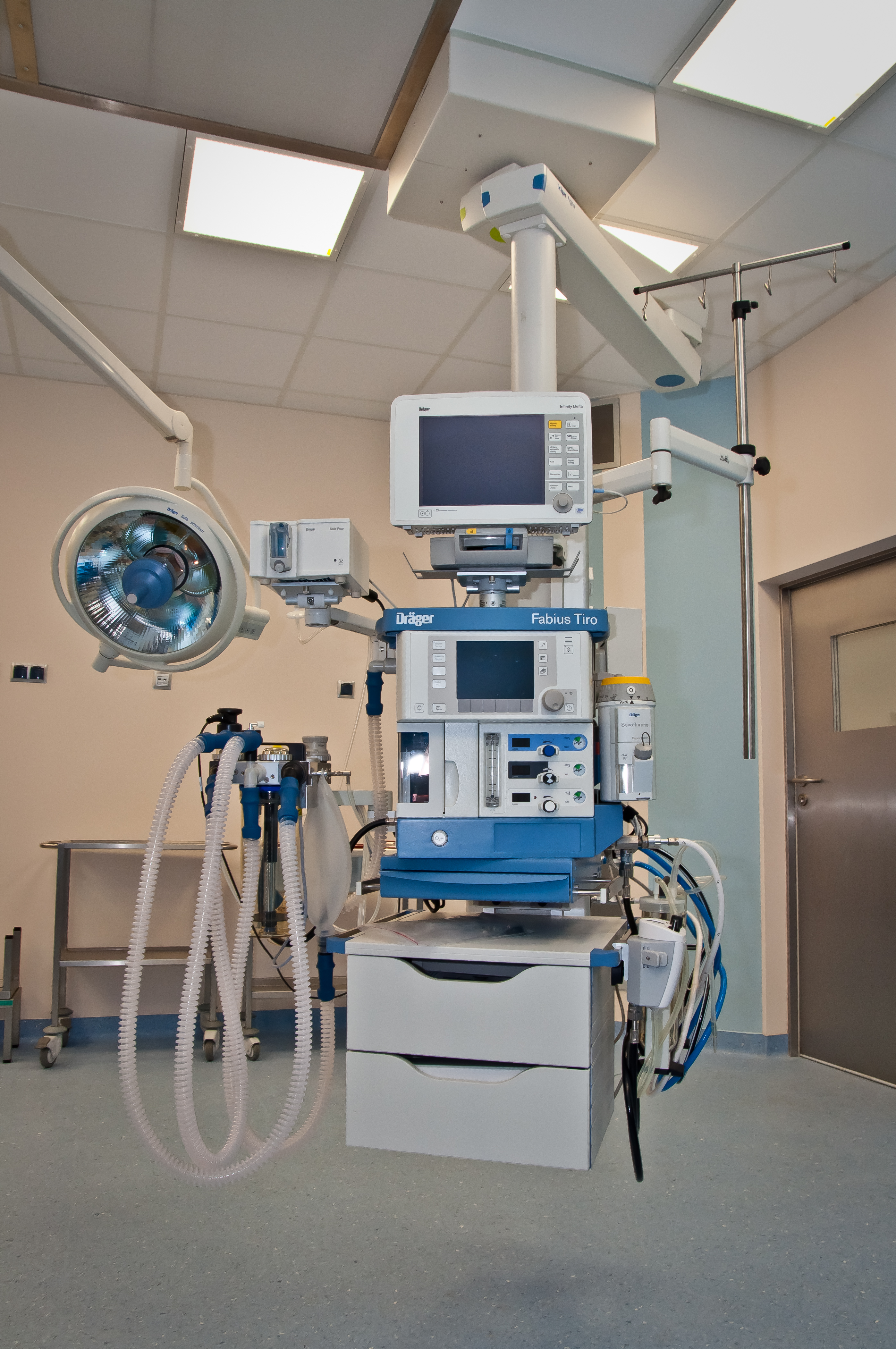 Sprzęt medyczny firmy Dräger: aparat do znieczulania Fabius Tiro zawieszony na kolumnie Agila. Z lewej strony lampa Sola 500. Aparat wyposażony w monitor Infinity Delta.